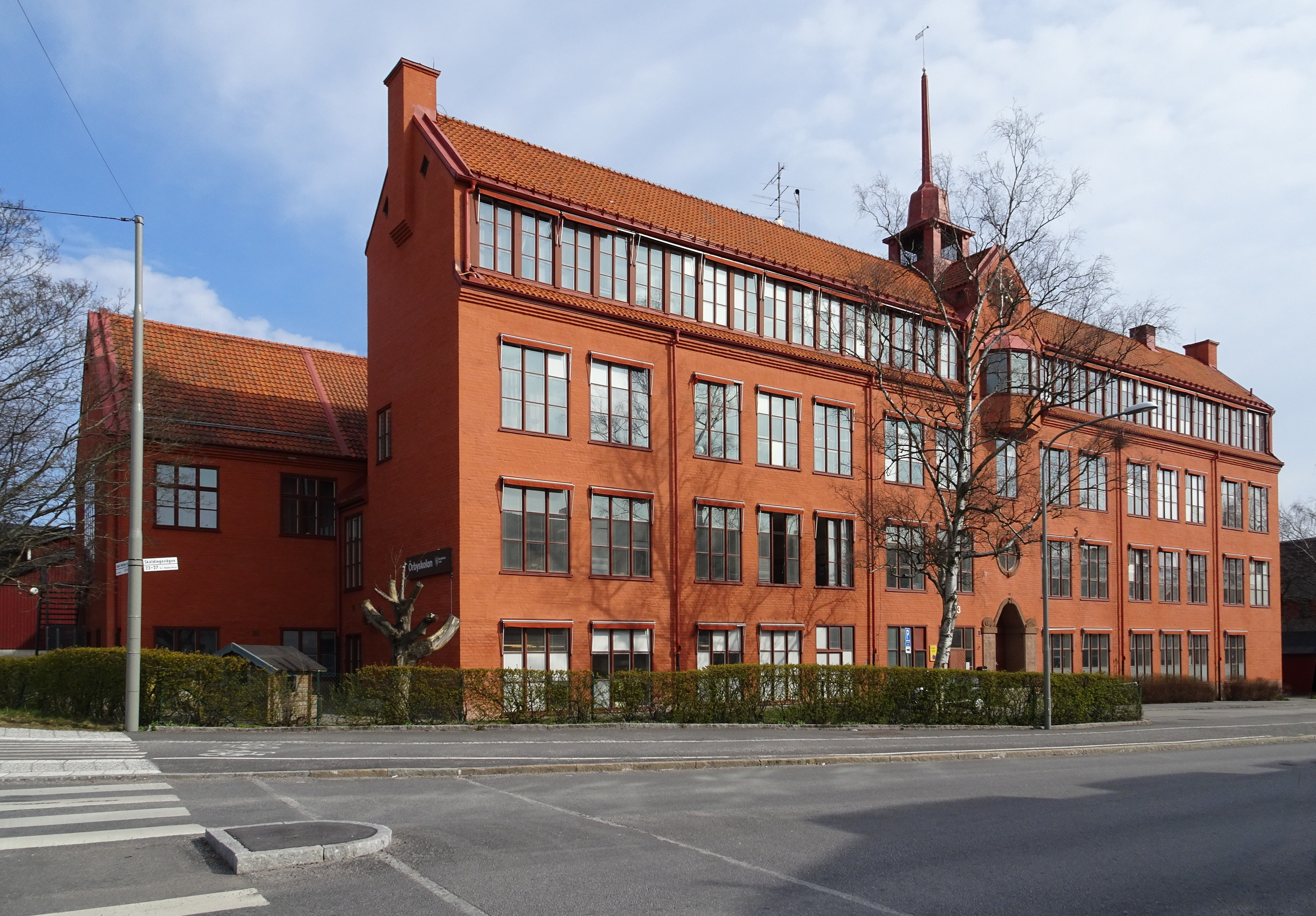 Örby nya skola byggår 1915, arkitekt Georg A. Nilsson